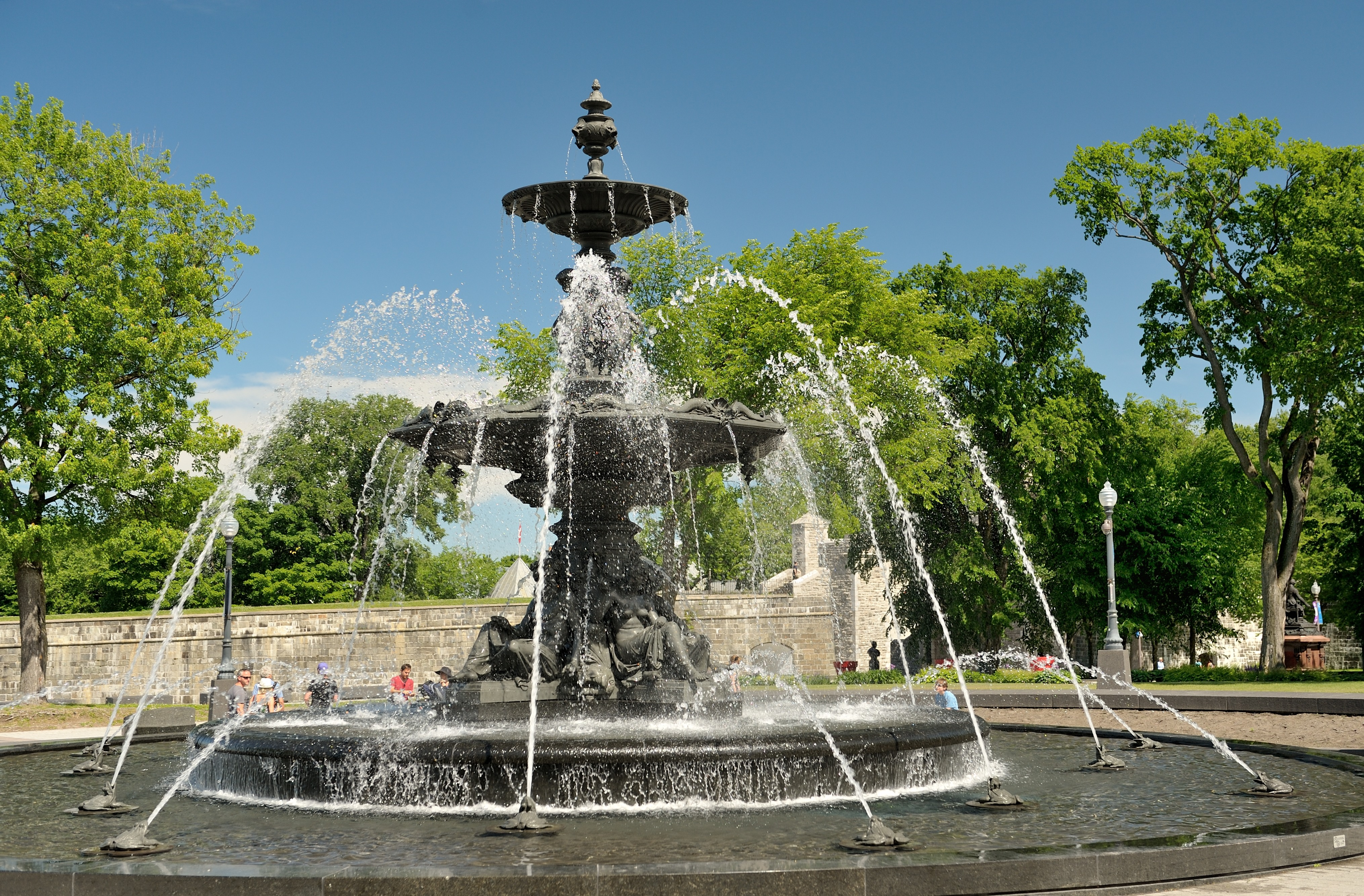 Face à l'Hôtel du Parlement de Québec, la Fontaine de Tourny est placée bien en évidence au centre du carrefour giratoire de l'avenue Honoré-Mercier. Elle a vécue plus d'un siècle à Bordeaux en France avant d'être acquise par la Maison Simons en 2003, qui l'a ensuite offerte à la Ville de Québec pour son 400e anniversaire. Inaugurée le 03 juillet 2007, elle figure déjà parmi les attractions incontournables de Québec avec ses 43 jets d'eau et sa mise en lumière nocturne.